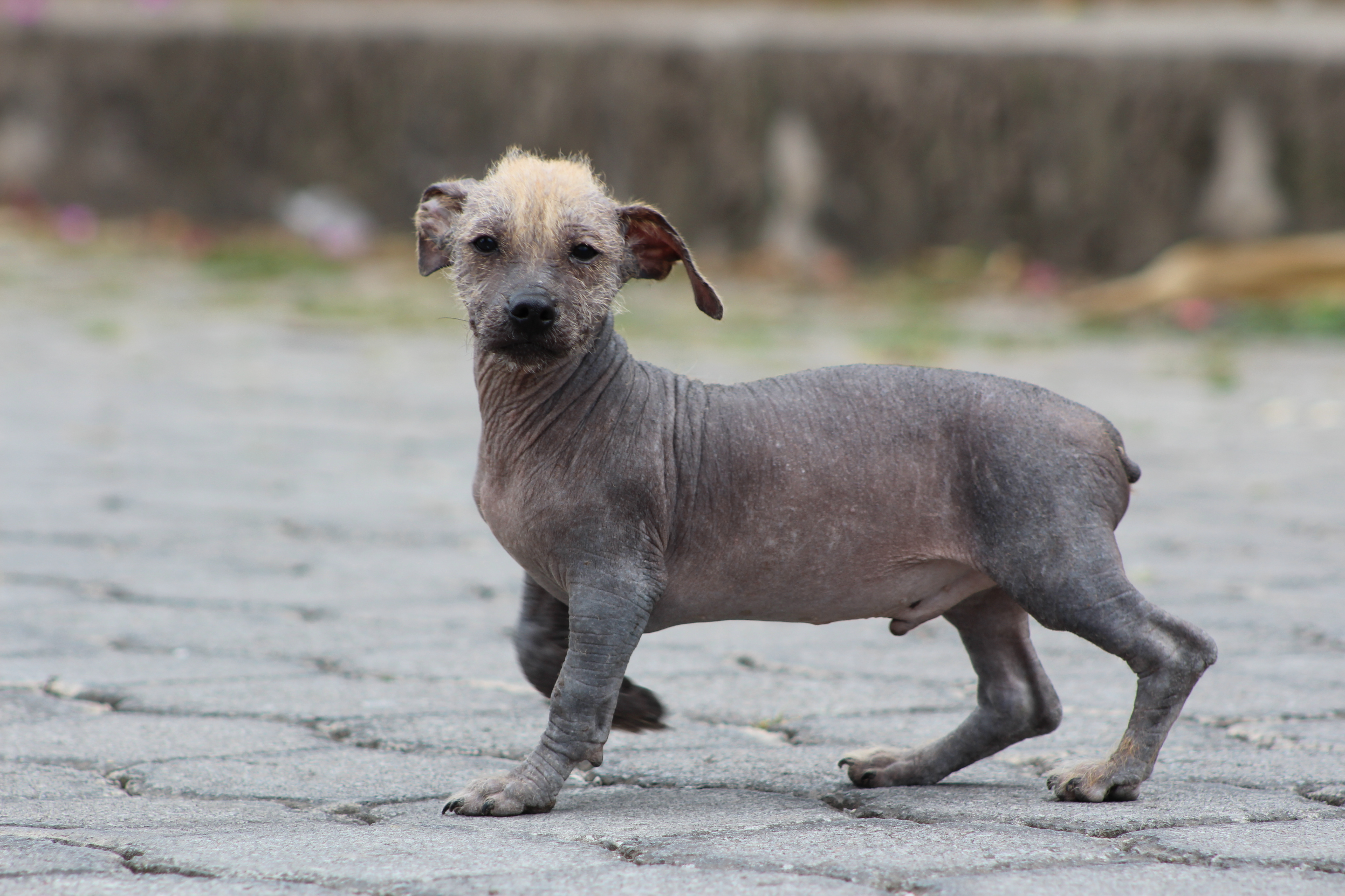 ejemplar macho de perro CALVO DORADO ECUATORIANO